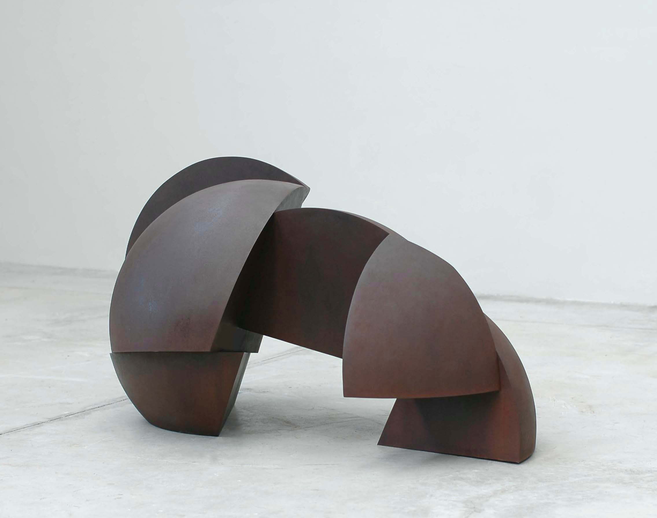 1º de Artes Plasticas "López Villaseñor", Ciudad Real